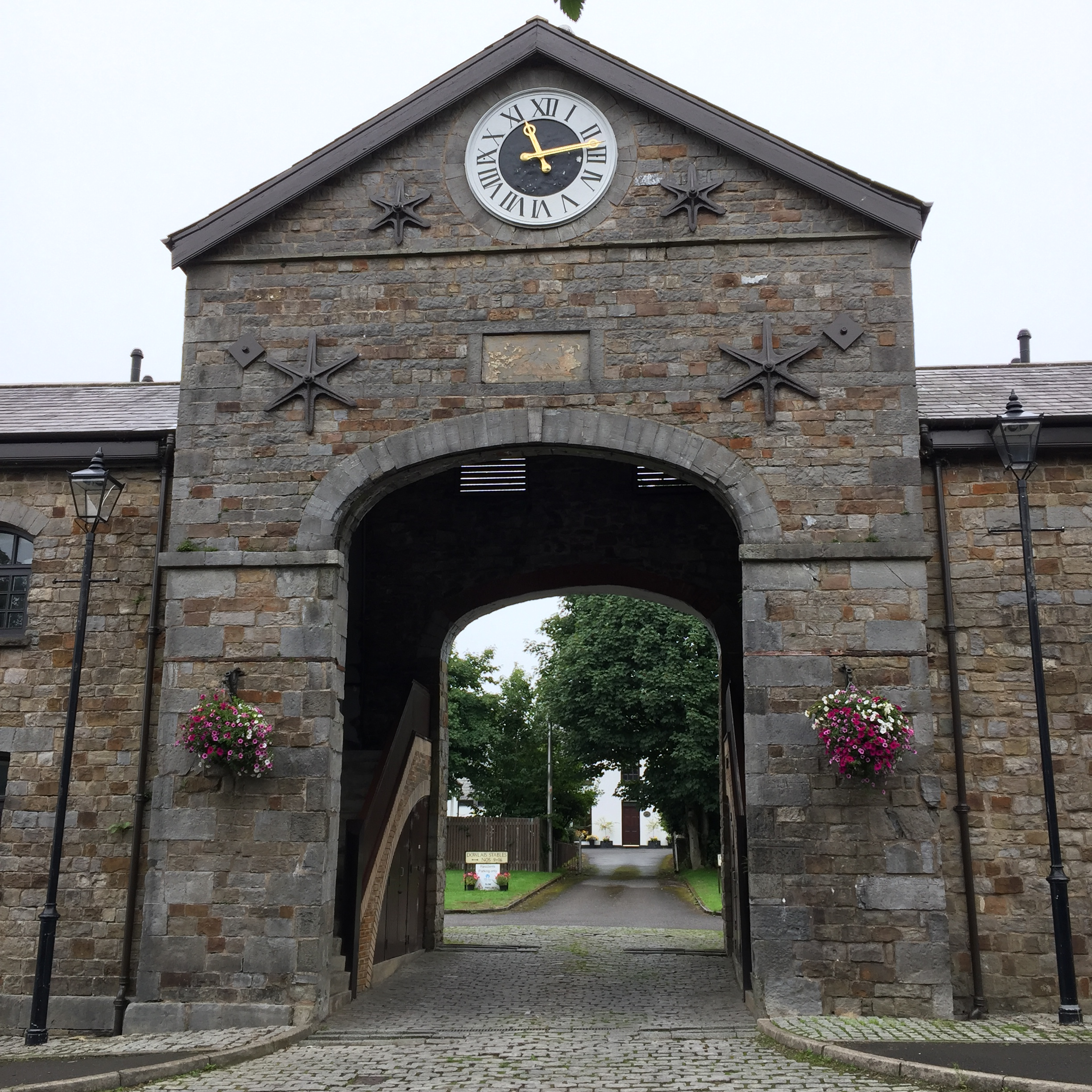 Yr hen stablau, Dowlais